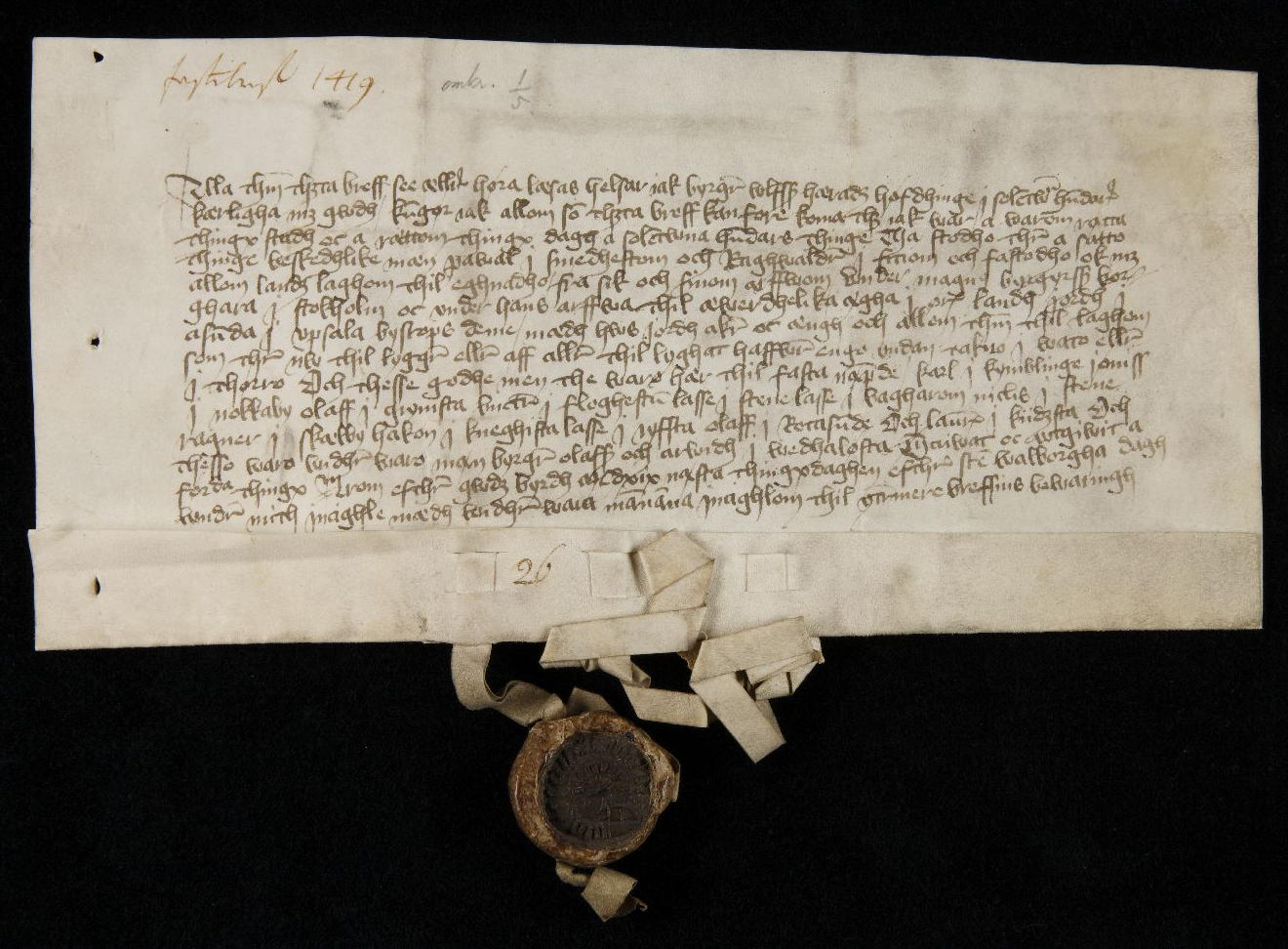 Birger Olofsson (Ulfsson), häradshövding i Sollentuna härad, utfärdar fastebrev på jord i Åsunda i Uppsala stift, som Paval i Smesta och Ragvald i Fittja avträtt till borgaren i Stockholm Magnus Birgersson. Utfärdandedatum: 1 maj 1419. Original pergament, Riksarkivet 0101. SDHK-nr 19273. Nationell ArkivDatabas, NAD.